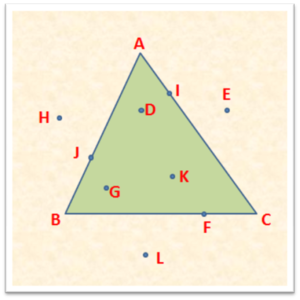 triangle interior and exterior angles